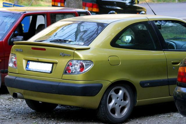 Citroen Xsara rear